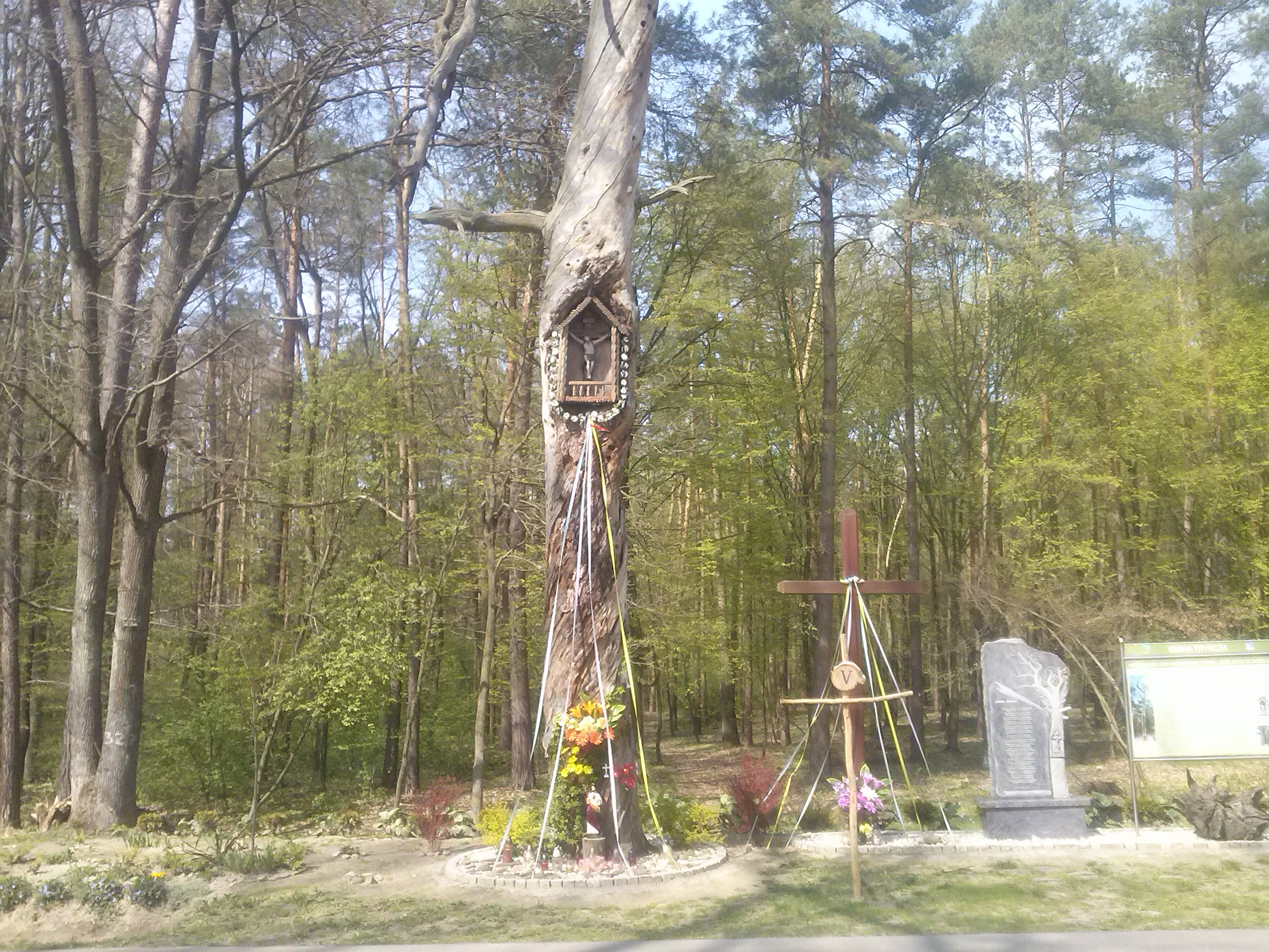 Kapliczka "Boża Męka" na suchej sośnie w Jagielle przy drodze do Gniewczyny Łańcuckiej.